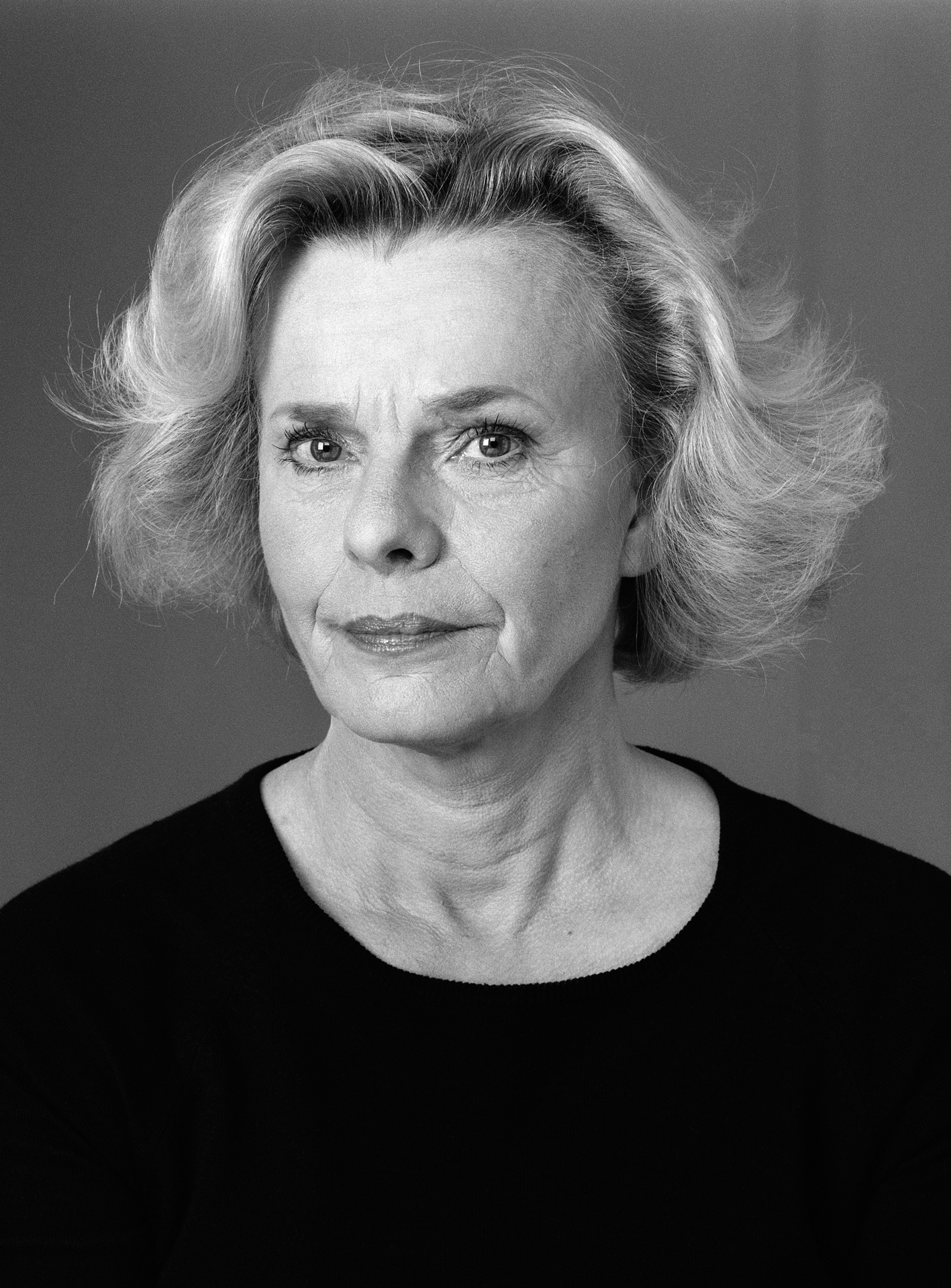 Skådespelerskan Marie Göranzon.